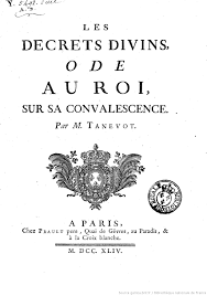 Page de couverture Les decrets divins de Tanevot